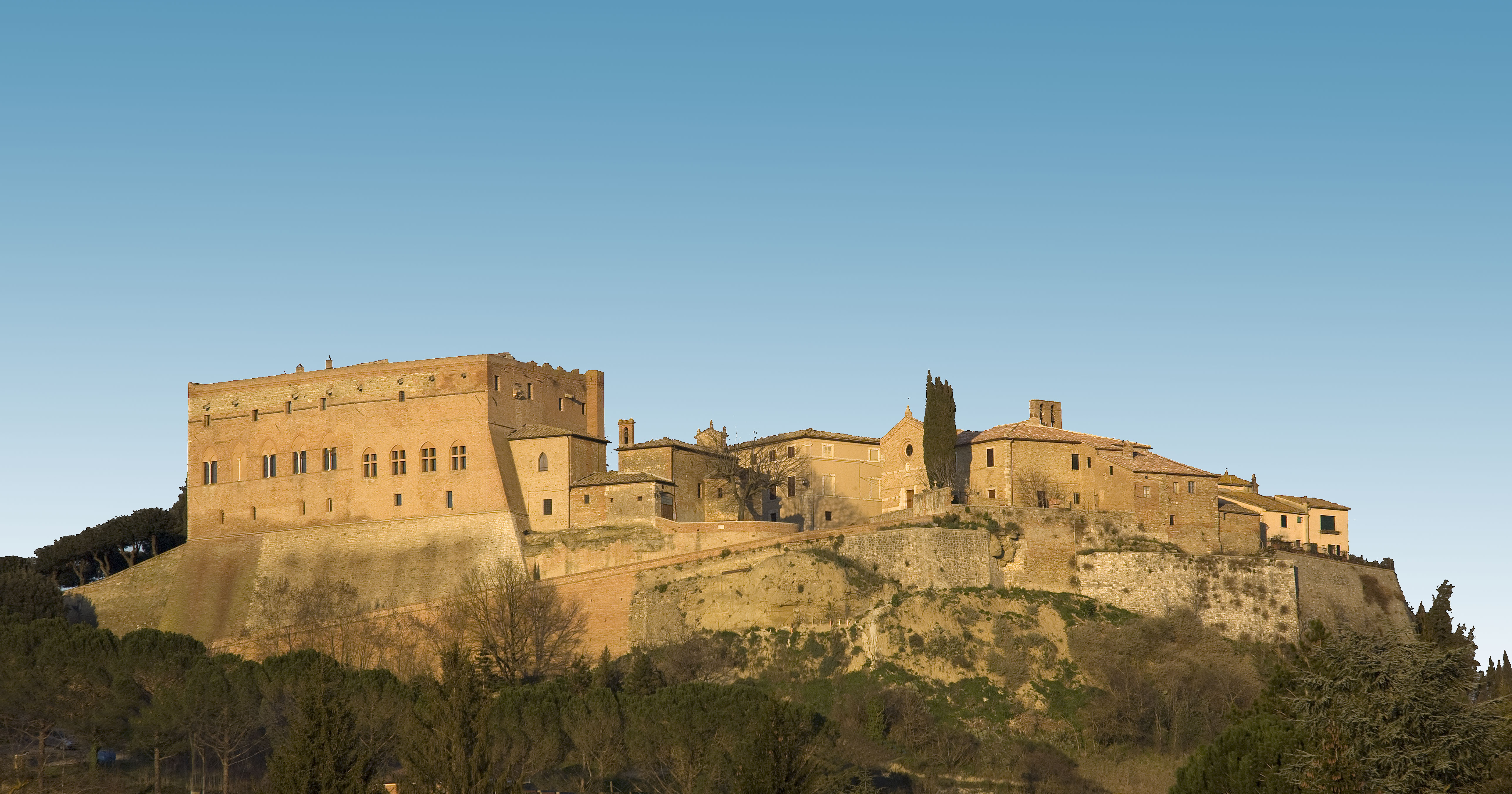 Panorama di San Giovanni d'Asso (Siena)